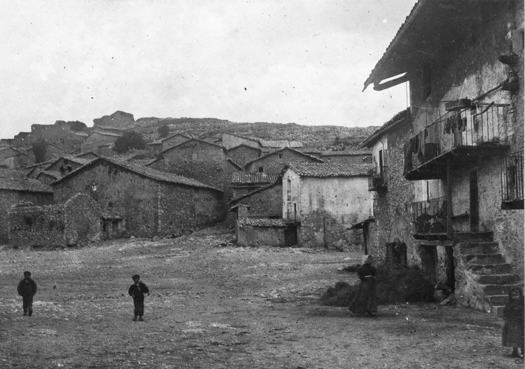 Plaça major de Gòsol amb nens i una dona. Juli Vintró i Casallachs (Entre 1890 i 1911)